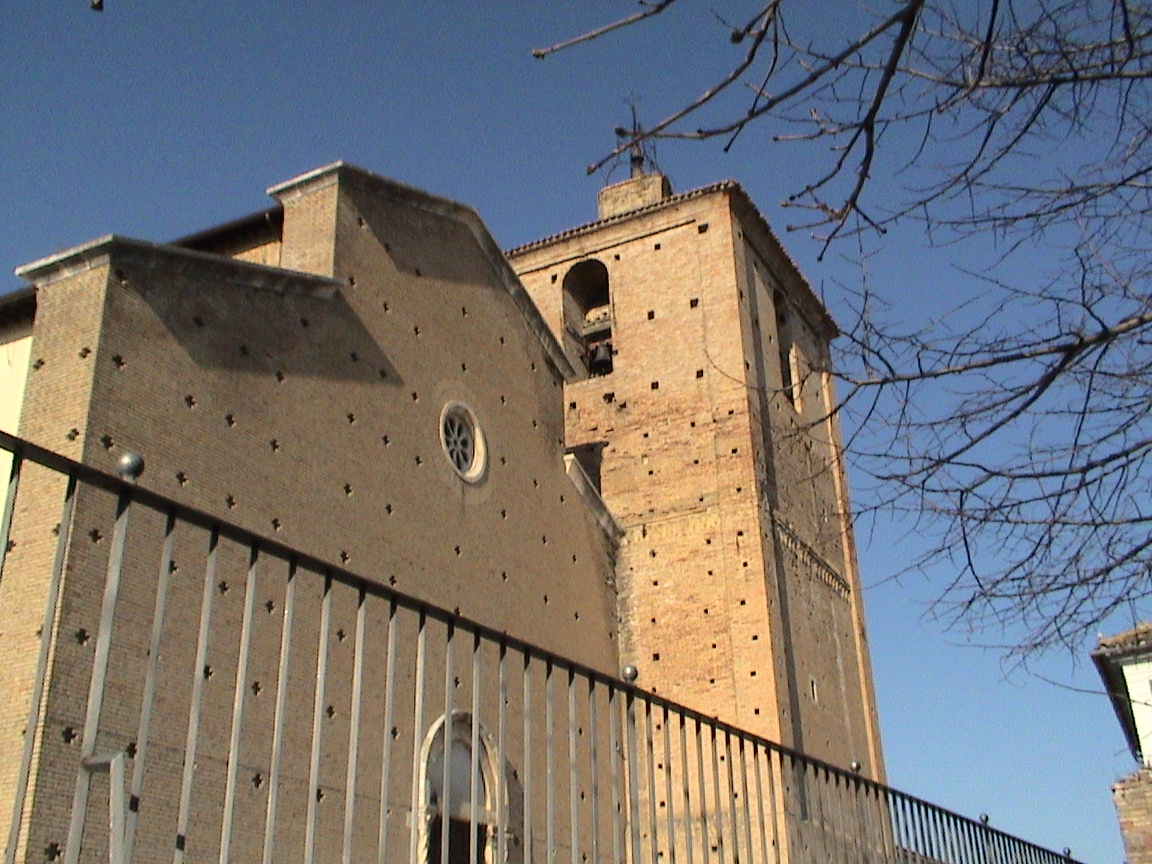 Autore: Claro48 Fonte: my own work Descrizione: Penne, scorcio del Duomo di Penne. Category:Cities of Abruzzo - Cities of Italy Licenza d'uso: free use